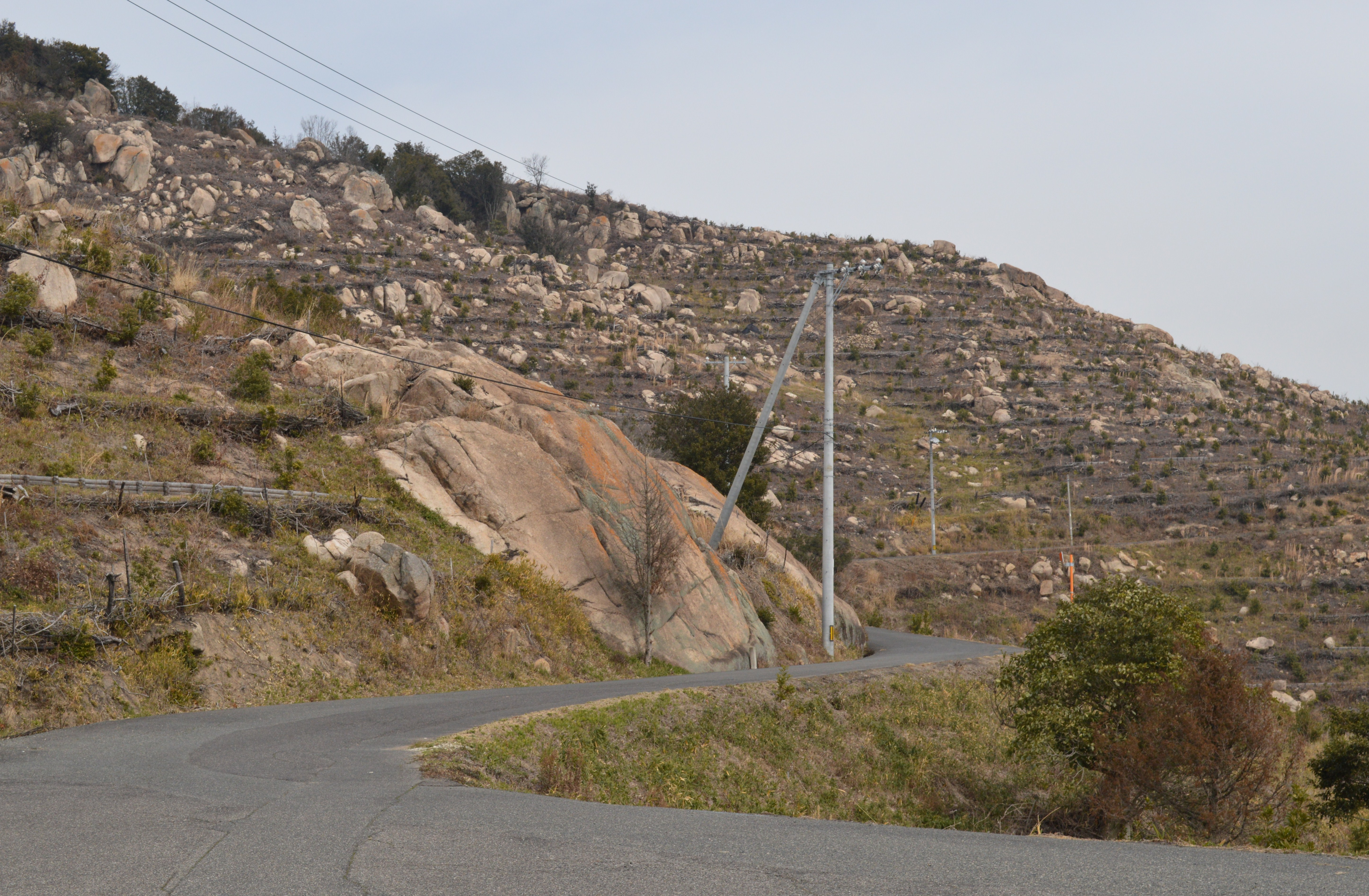 岡山県瀬戸内市牛窓町の前島。前島には大阪城築城残石群がある。